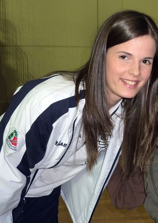 Sanja Malagurski, pallavolista serba, gioca nel ruolo di schiacciatrice ed opposto